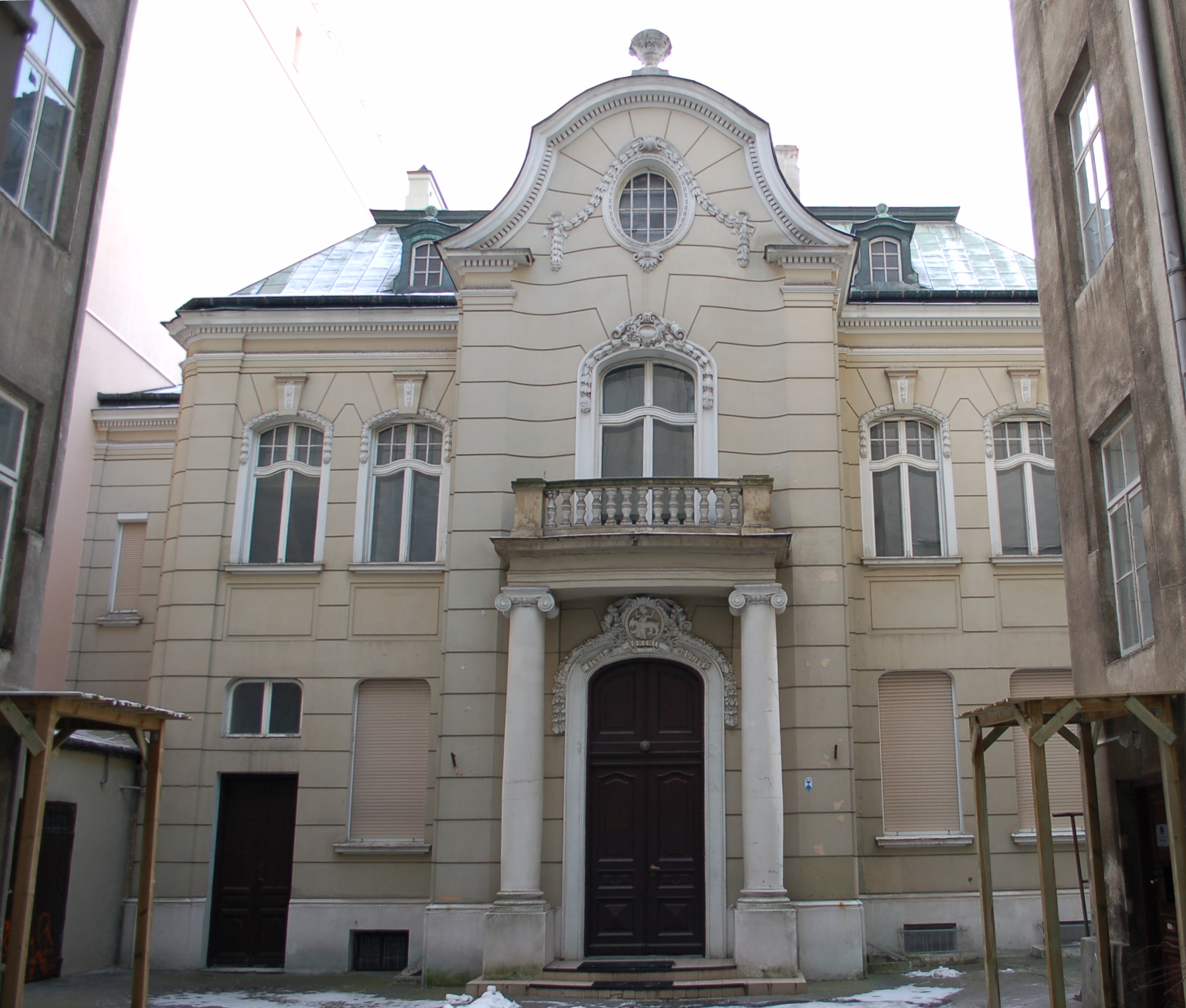 Rusiecki Palace in the backyard Ulica Lwowska 13, Warsaw